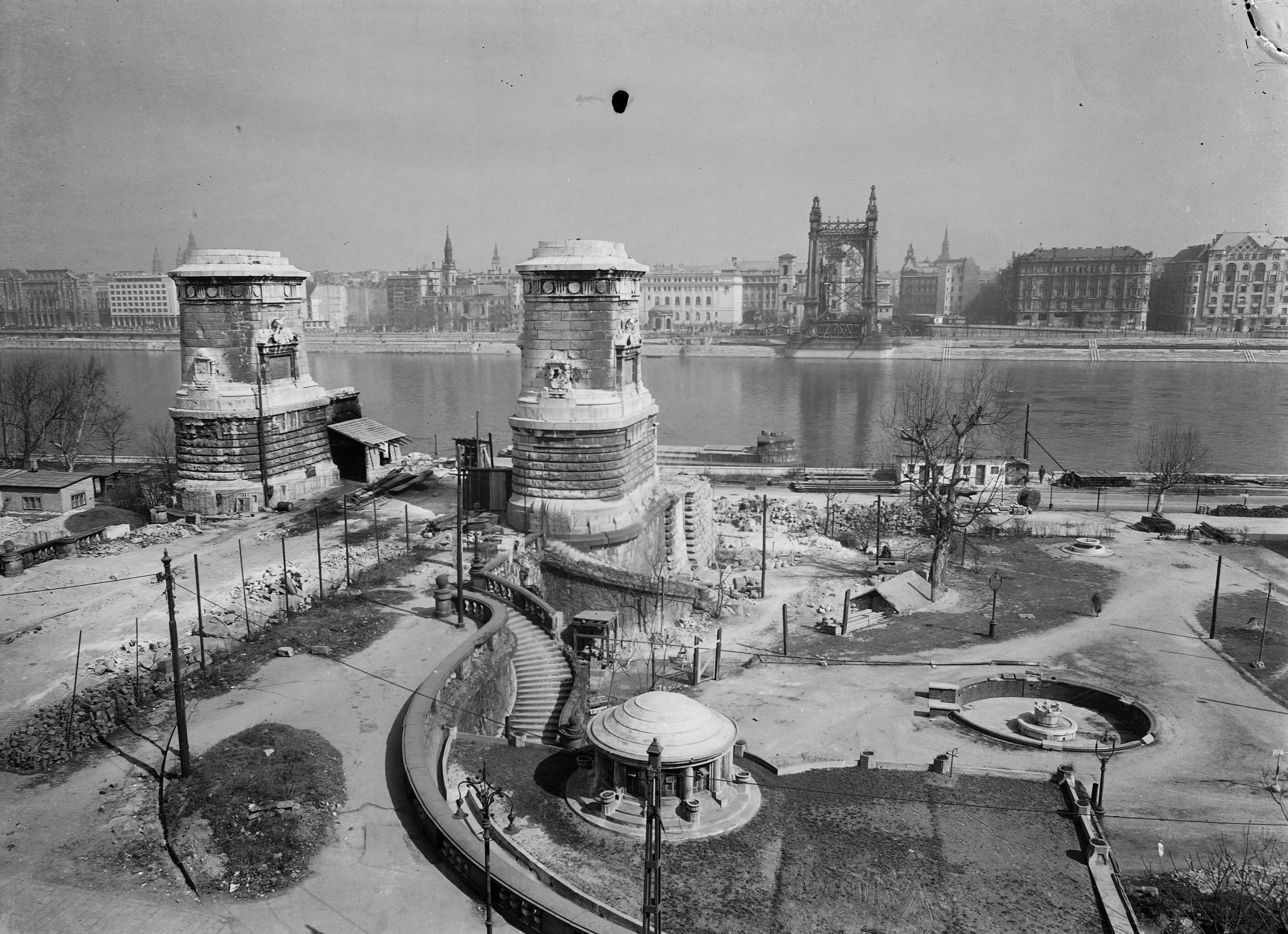 a lerombolt Erzsébet híd budai hídfője. Location: Hungary, Budapest I. Tags: picture, Budapest, bridge Title: a lerombolt Erzsébet híd budai hídfője.